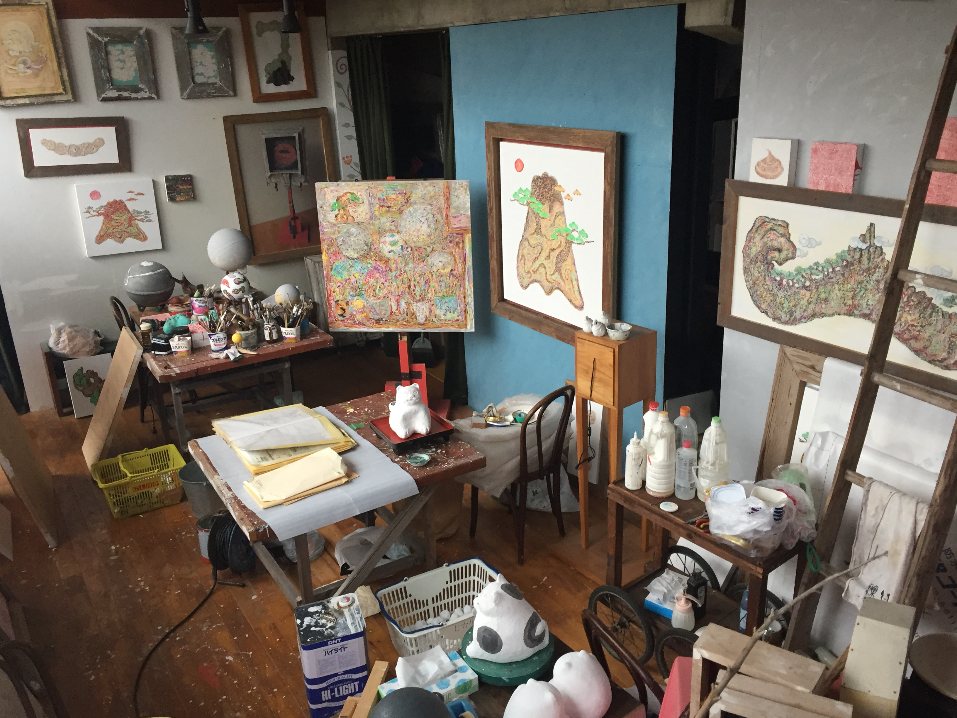 京丹後市網野町浜詰 ヒカリ美術館 作業スペース（2019.2.11時点） ※この写真は美術館の許可を得て撮影をしました。